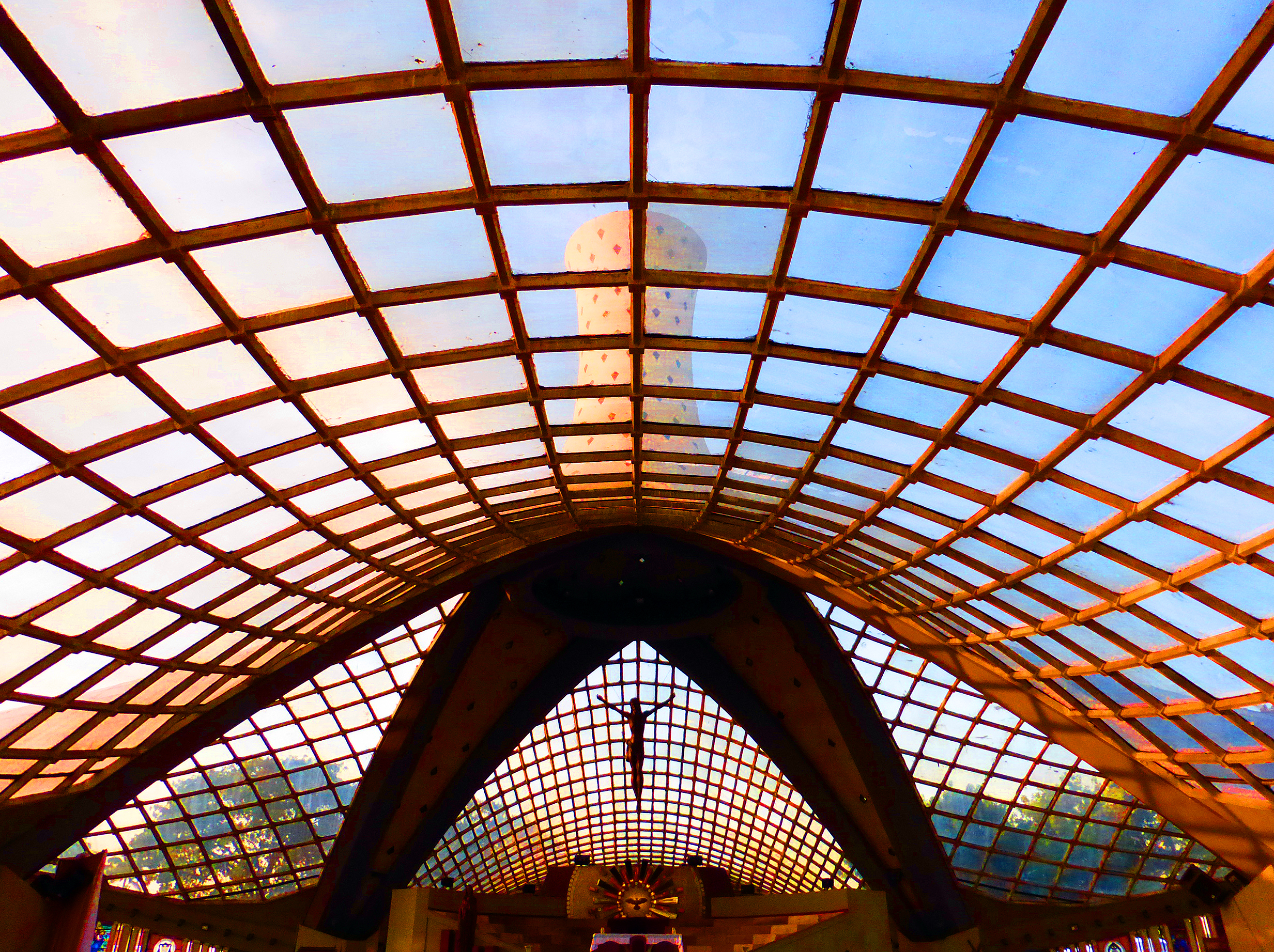 Atardecer en la Catedral de Barquisimeto en un 14 de enero.